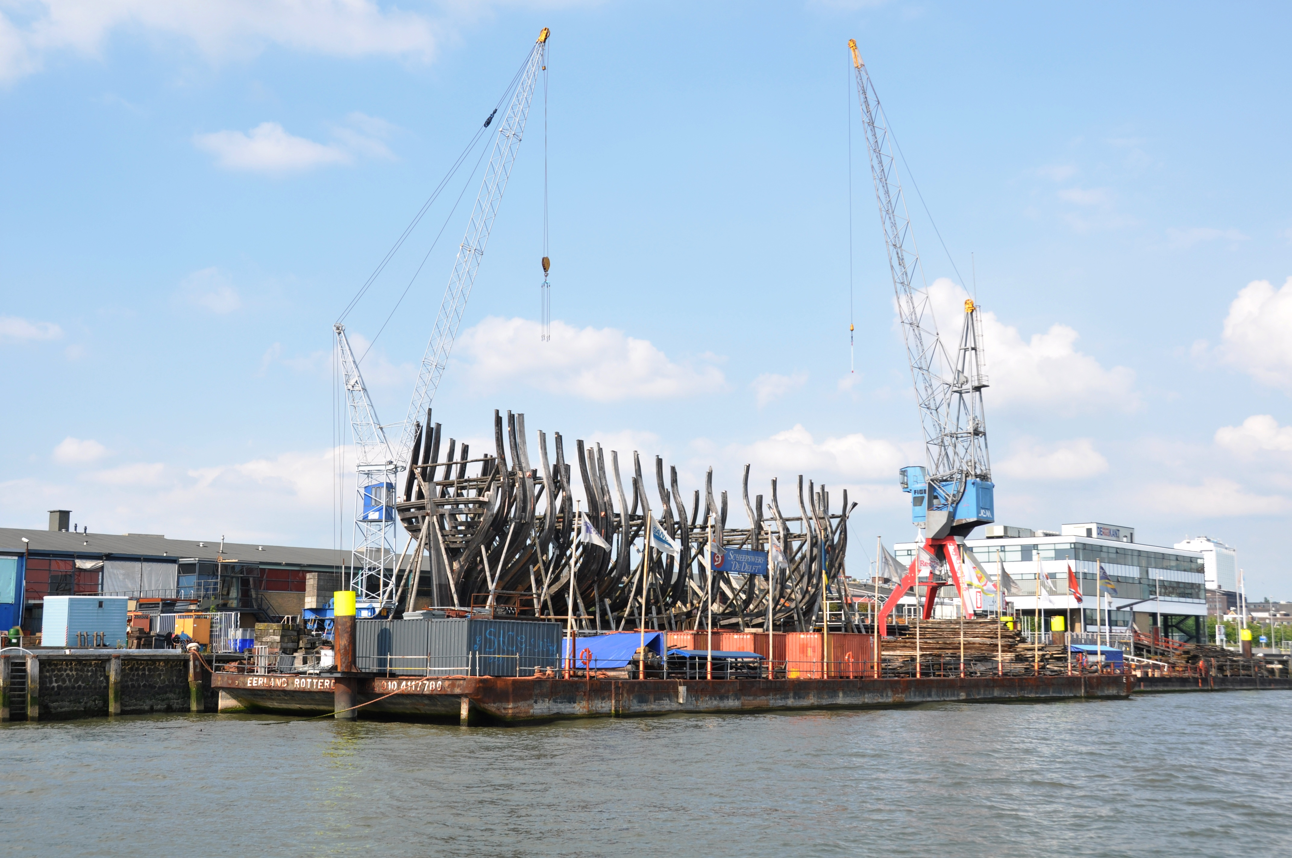 Het schip DE DELFT in aanbouw op de wal in Delfshaven.